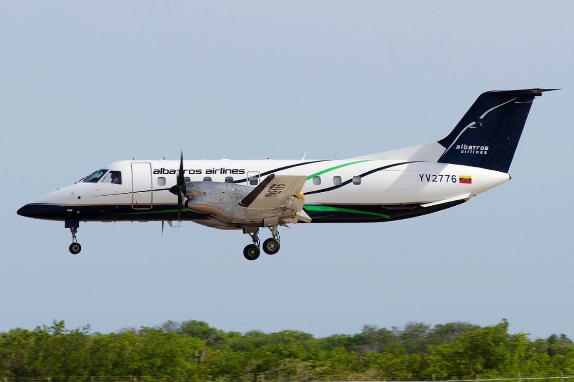 Embraer EMB-120RT